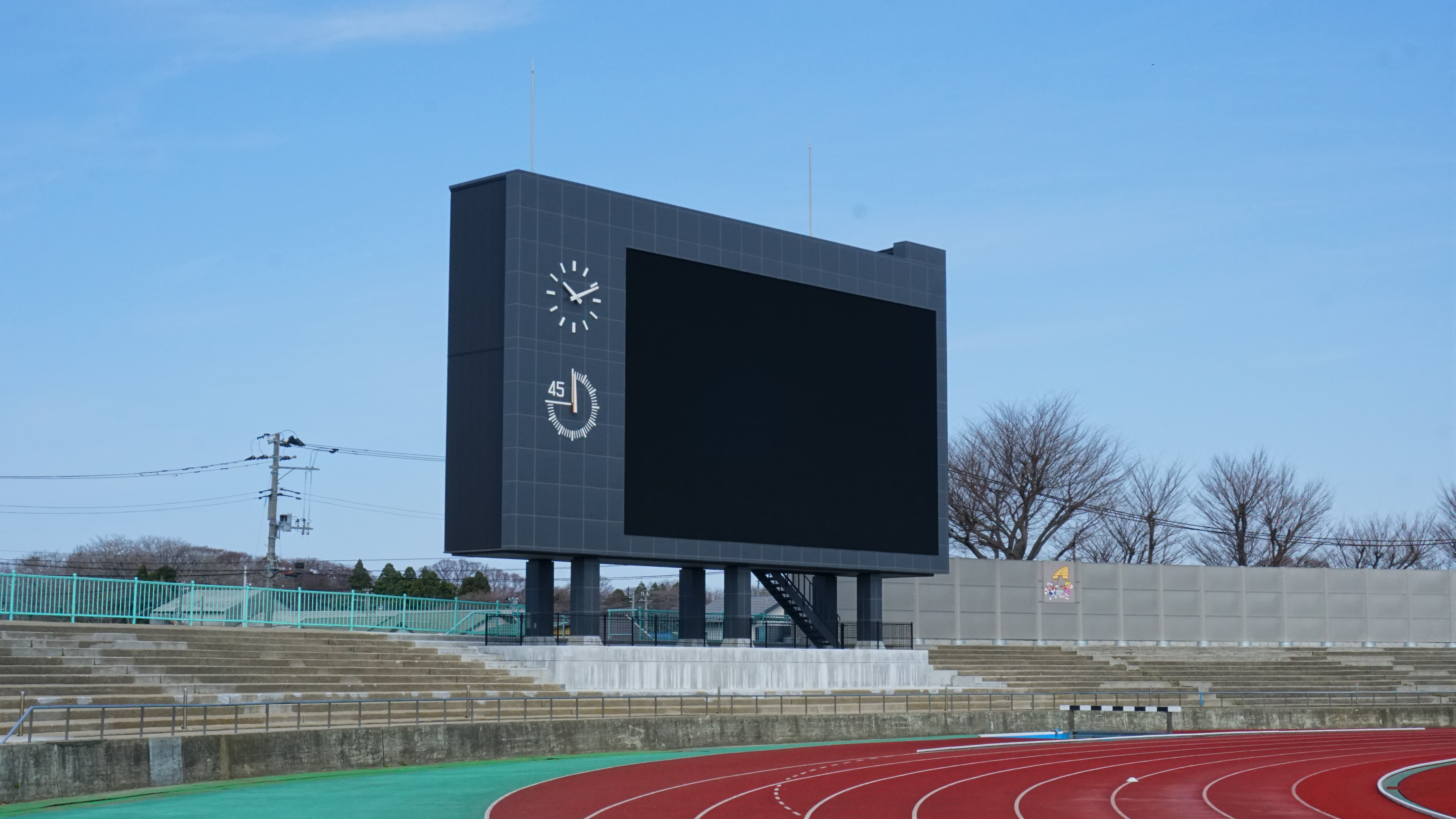 秋田市八橋運動公園陸上競技場映像装置